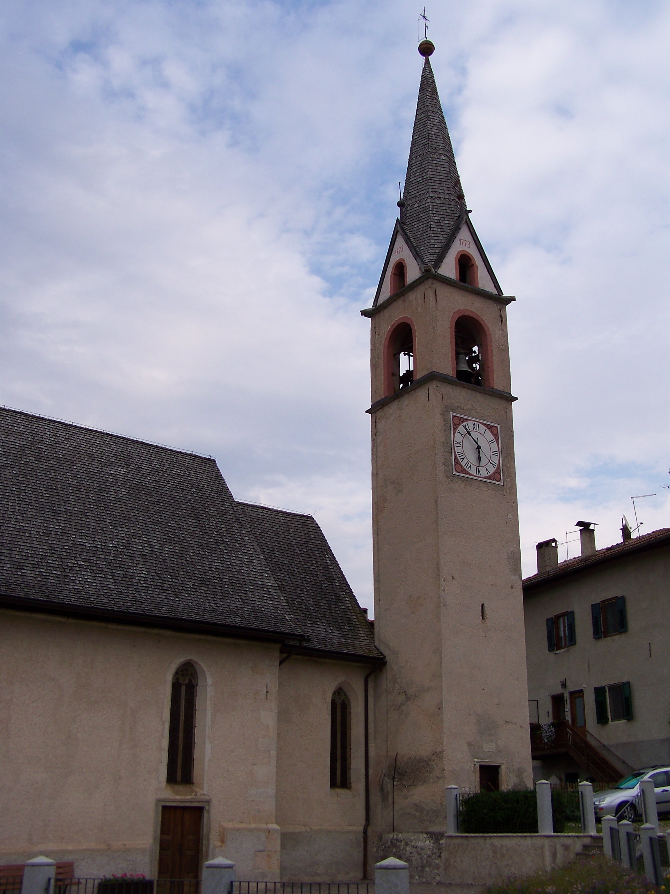 La torre campanaria della chiesa di San Giorgio a Seio di Sarnonico.